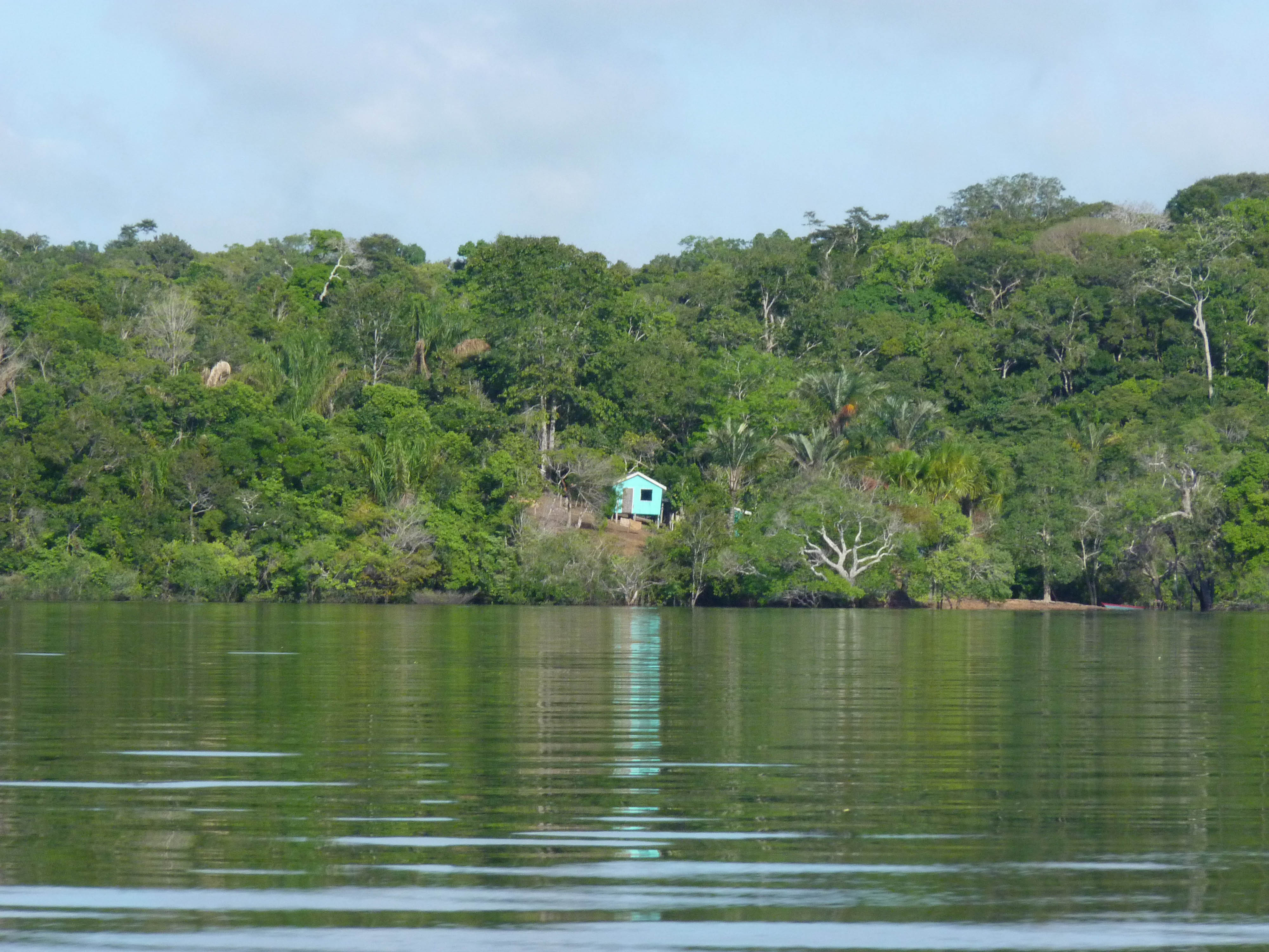 Casa no parque nacional anavilhana